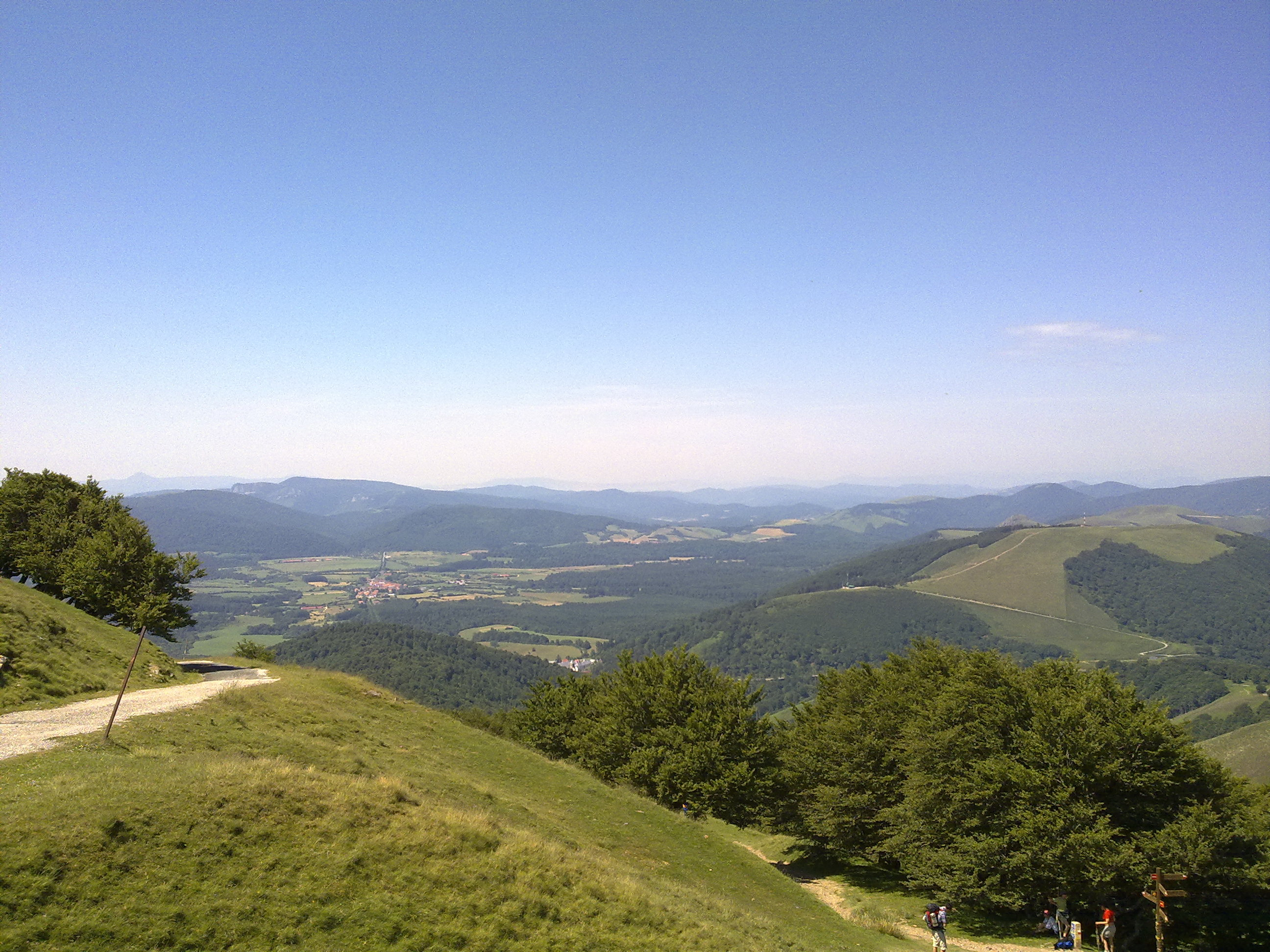 Collado de Lepoeder - Camino 2009